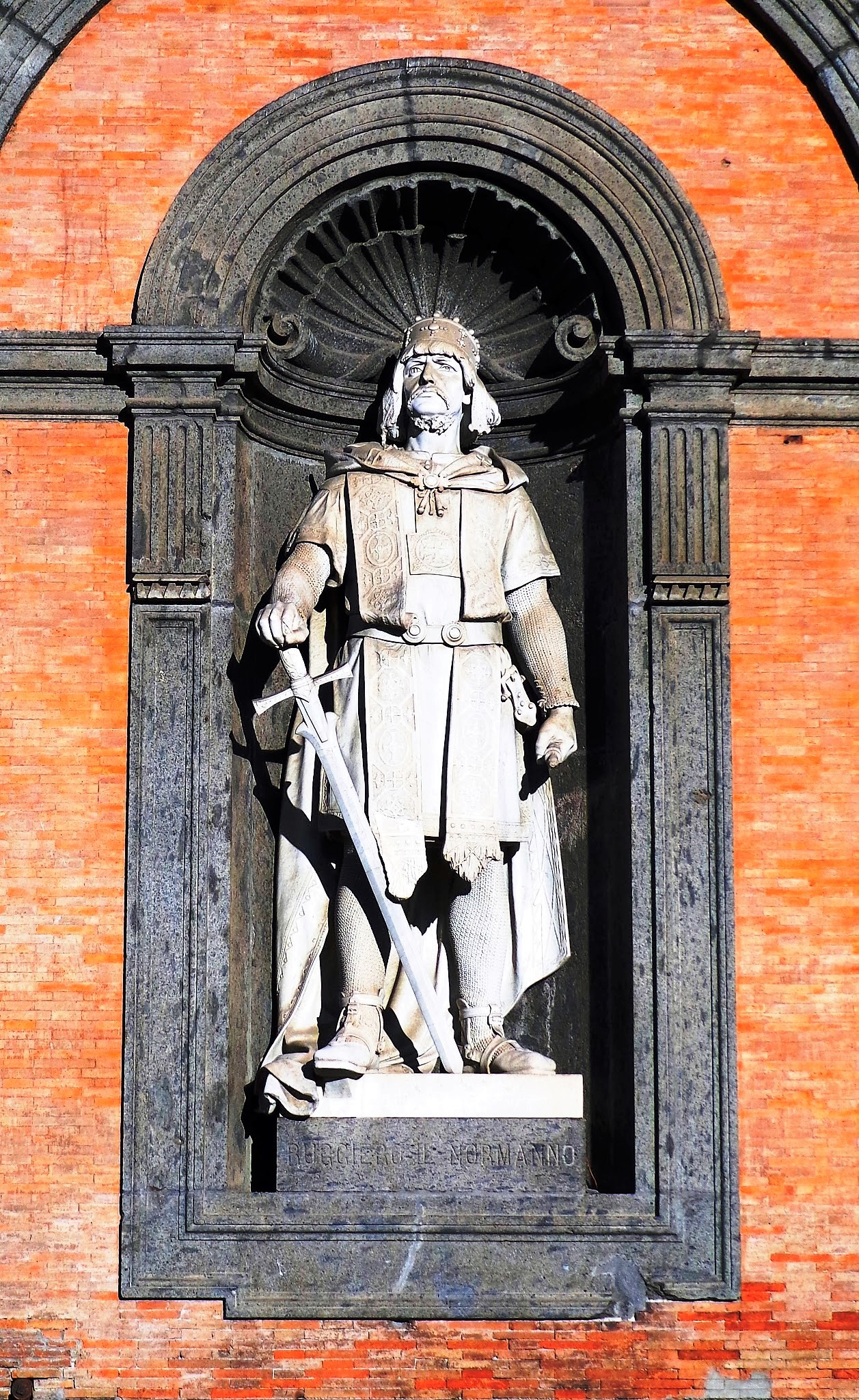 Statua di Ruggero il Normanno